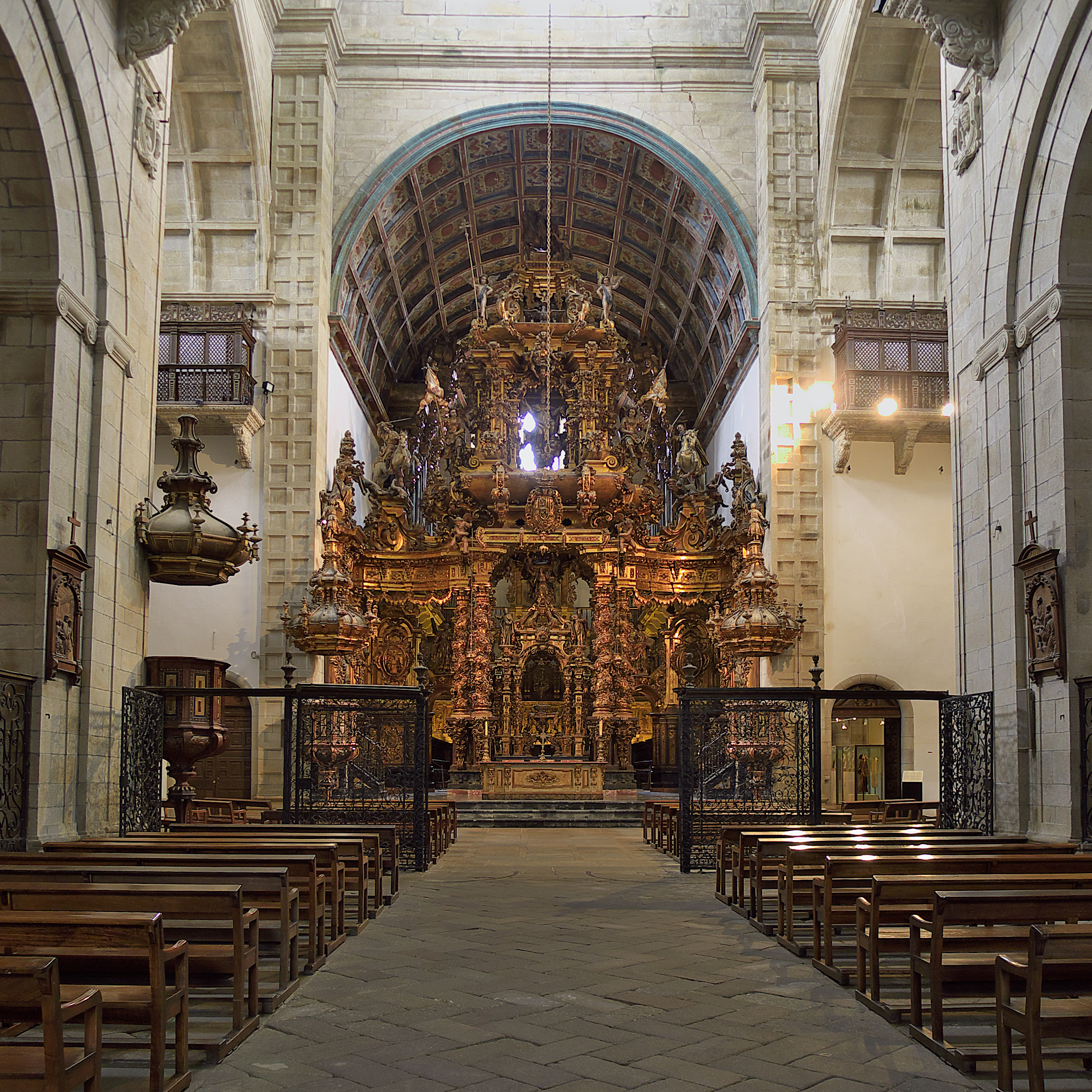 Miguel de Romay se consagra como escultor del barroco español con este soberbio retablo (1730-1733)